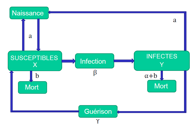 Schéma simple de la dynamique hôte-parasite d'après "The Population Dynamics of Microparasites and Their Invertebrate Hosts; R. M. Anderson and R. M. May -Philosophical Transactions of the Royal Society of London. Series B, Biological Sciences; Vol. 291, No. 1054 (Apr. 27, 1981), p. 451-524"